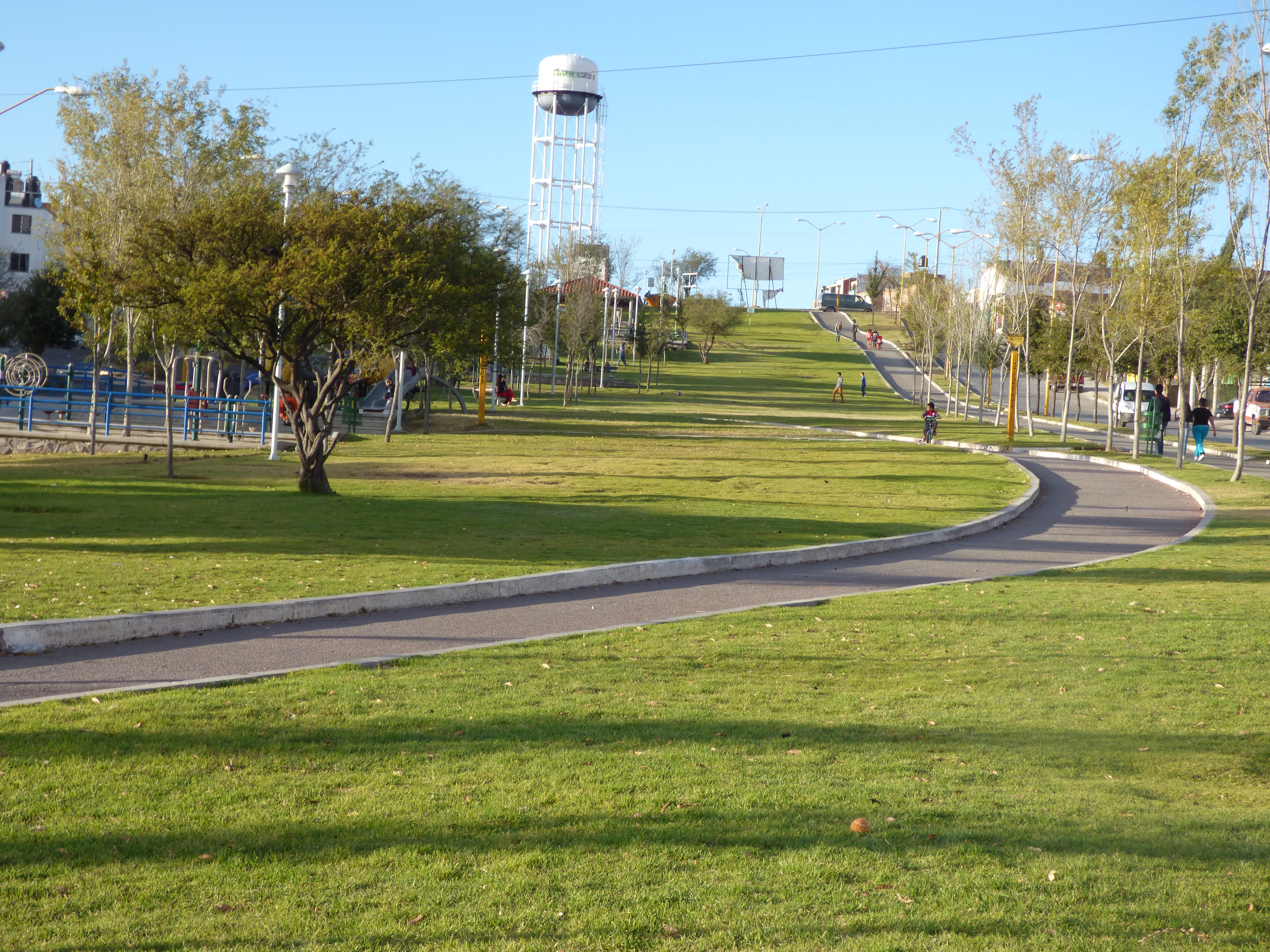 Parque Línea Verde (a la altura de Rodolfo Landeros), Aguascalientes, Ags.